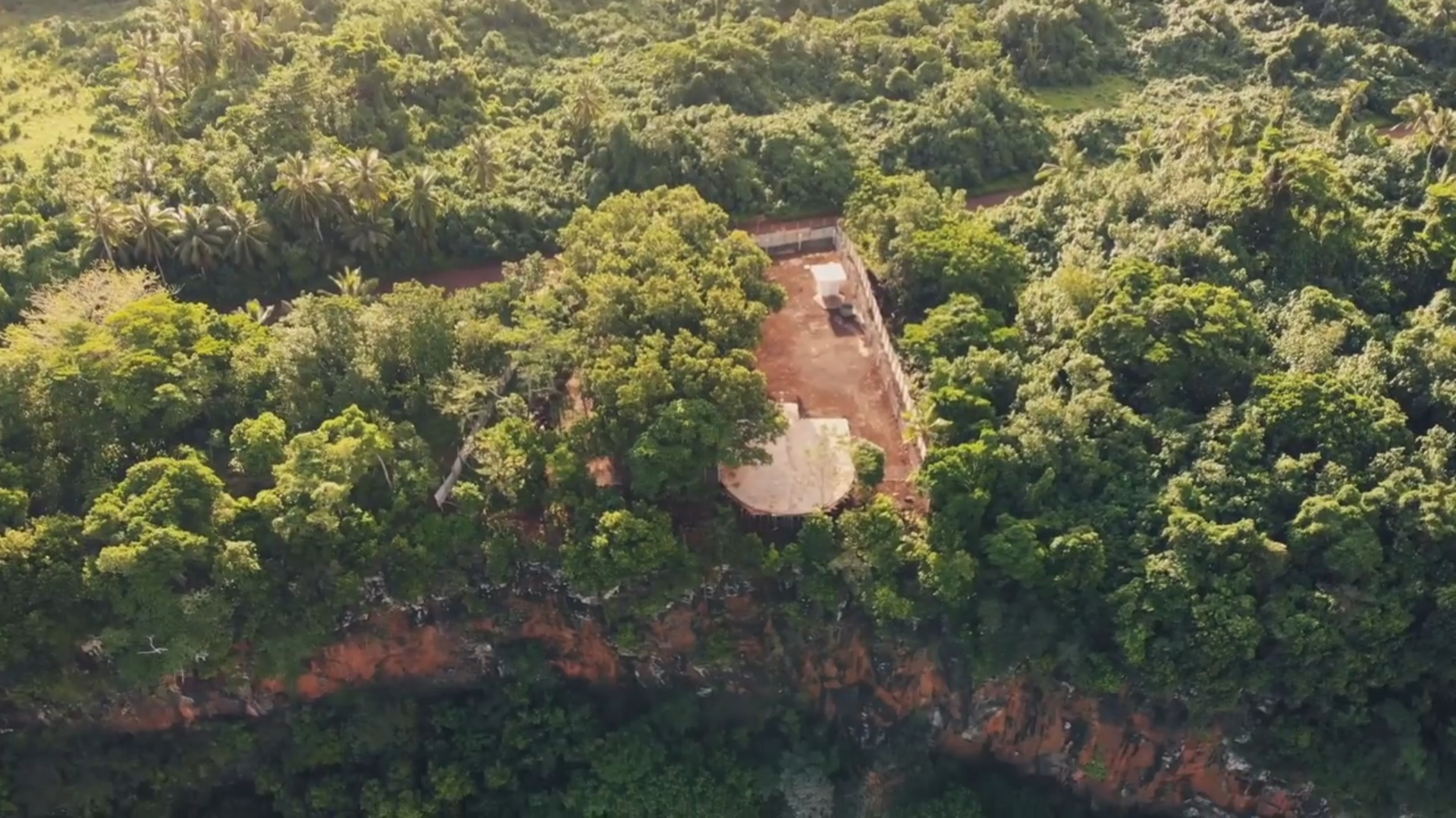 vue du belvédère du lac Lalolalo (Wallis et Futuna). Image prise par un drone en septembre 2018.